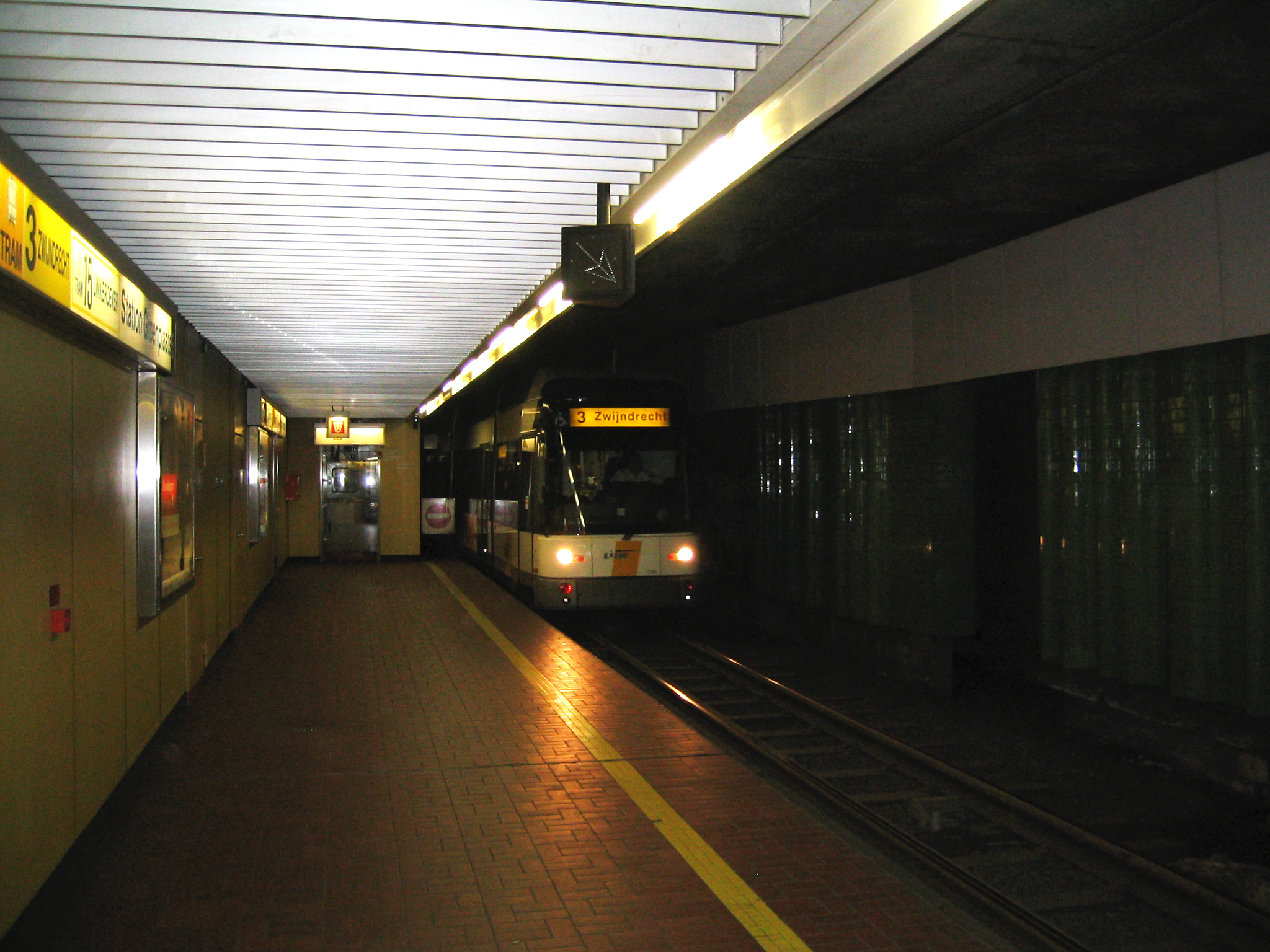 Premetro-Train entering Station Groenplaats in Antwerp/Belgium